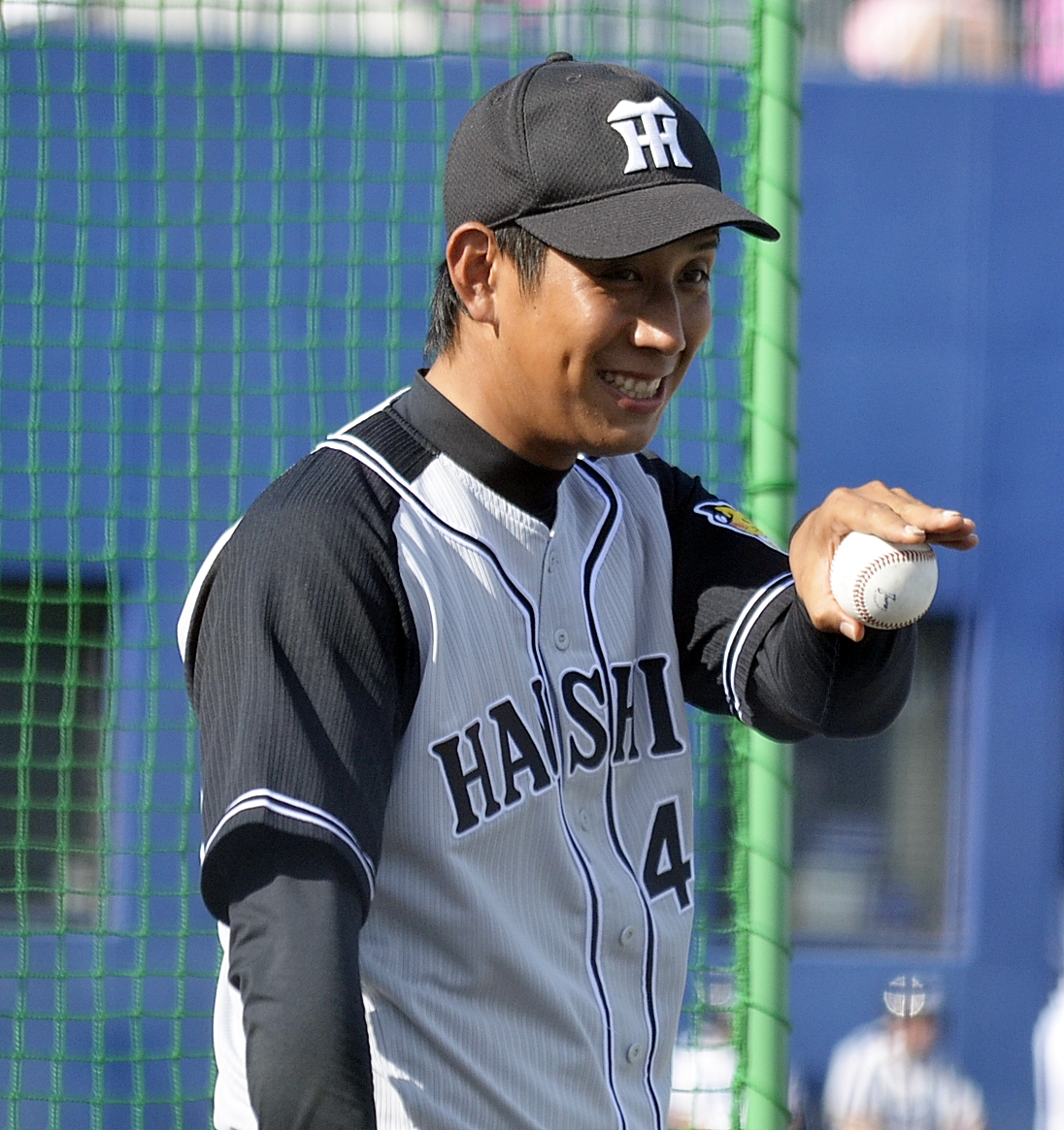 阪神タイガースの山本翔也投手